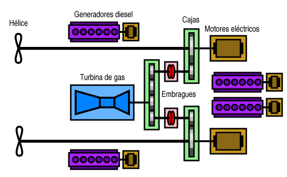 Esquema de un sistema de propulsión CODLAG Same as Image:CODLAG-diagram.png with Spanish legend. Modified version of a public domain drawing made by Alureiter. Modifications also released into public domain. Idéntica a Image:CODLAG-diagram.png con leyendas en español. Versión modificada de un dibujo hecho por Alureiter y puesto por él en el dominio público. Las modificaciones son también colocadas en el dominio público.